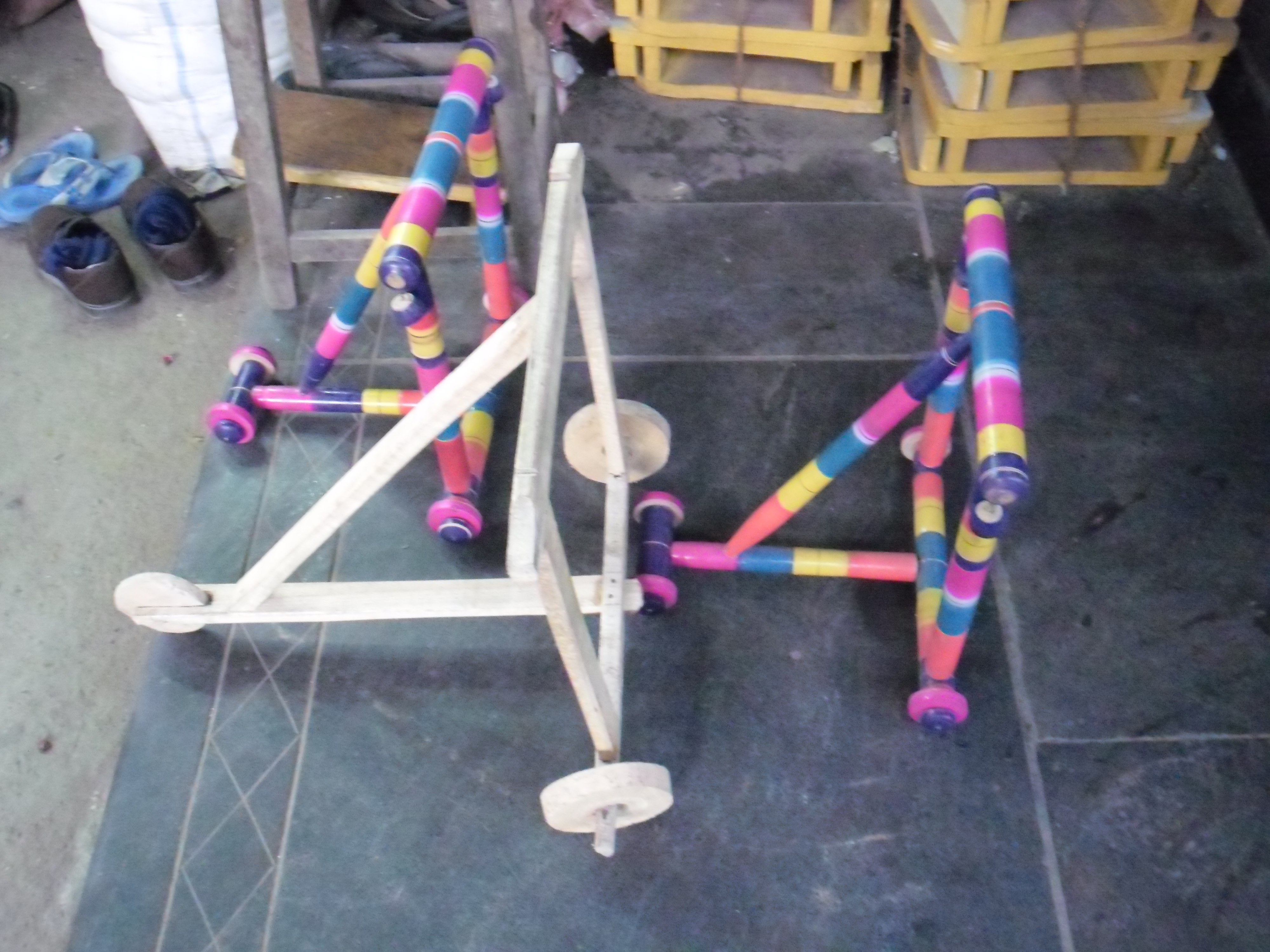 நடைவண்டி